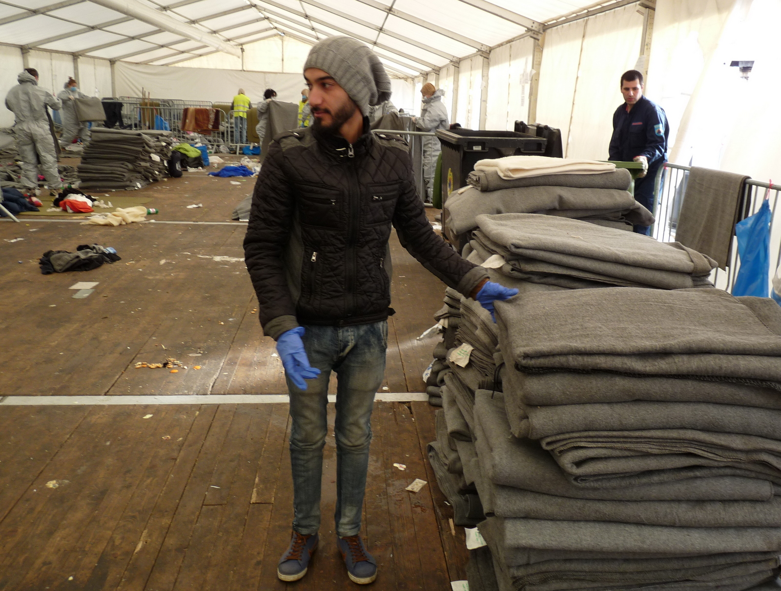 Begunec iz Iraka v Dobovi